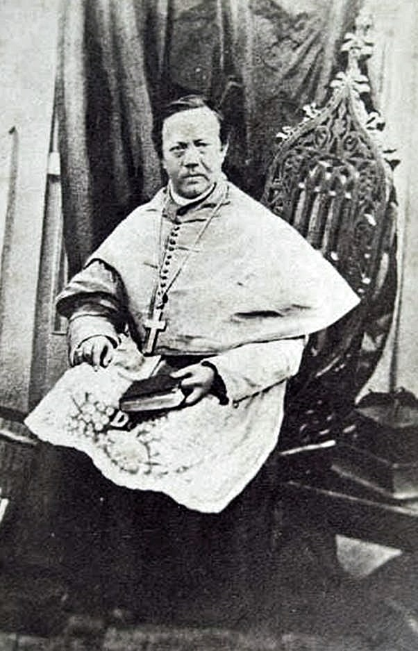 Bischof John Henry Luers (1819-1871), von Fort Wayne, Indiana